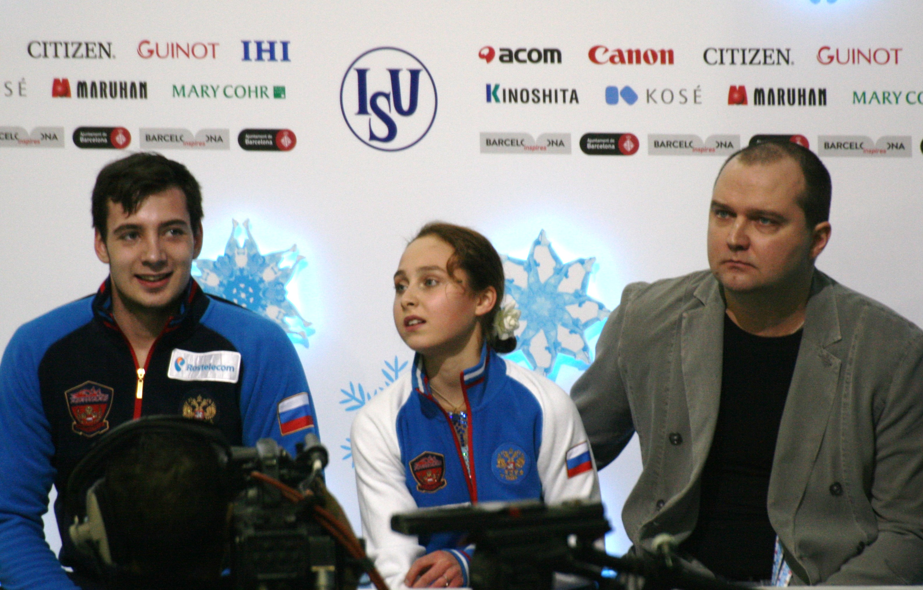 Камилла Гайнетдинова и Сергей Алексеев со своим тренером Станиславом Морозовым на финале Гран-при среди юниоров 2014-2015.